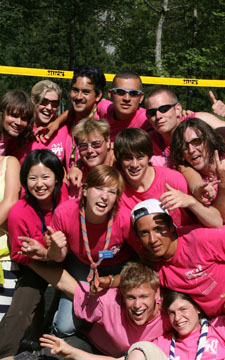 Kandersteg staff volleyball